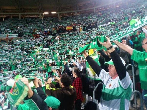 Afición del Elche en Murcia - Elche